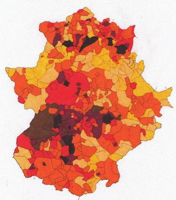 Mapa de Densidad de Extremadura.